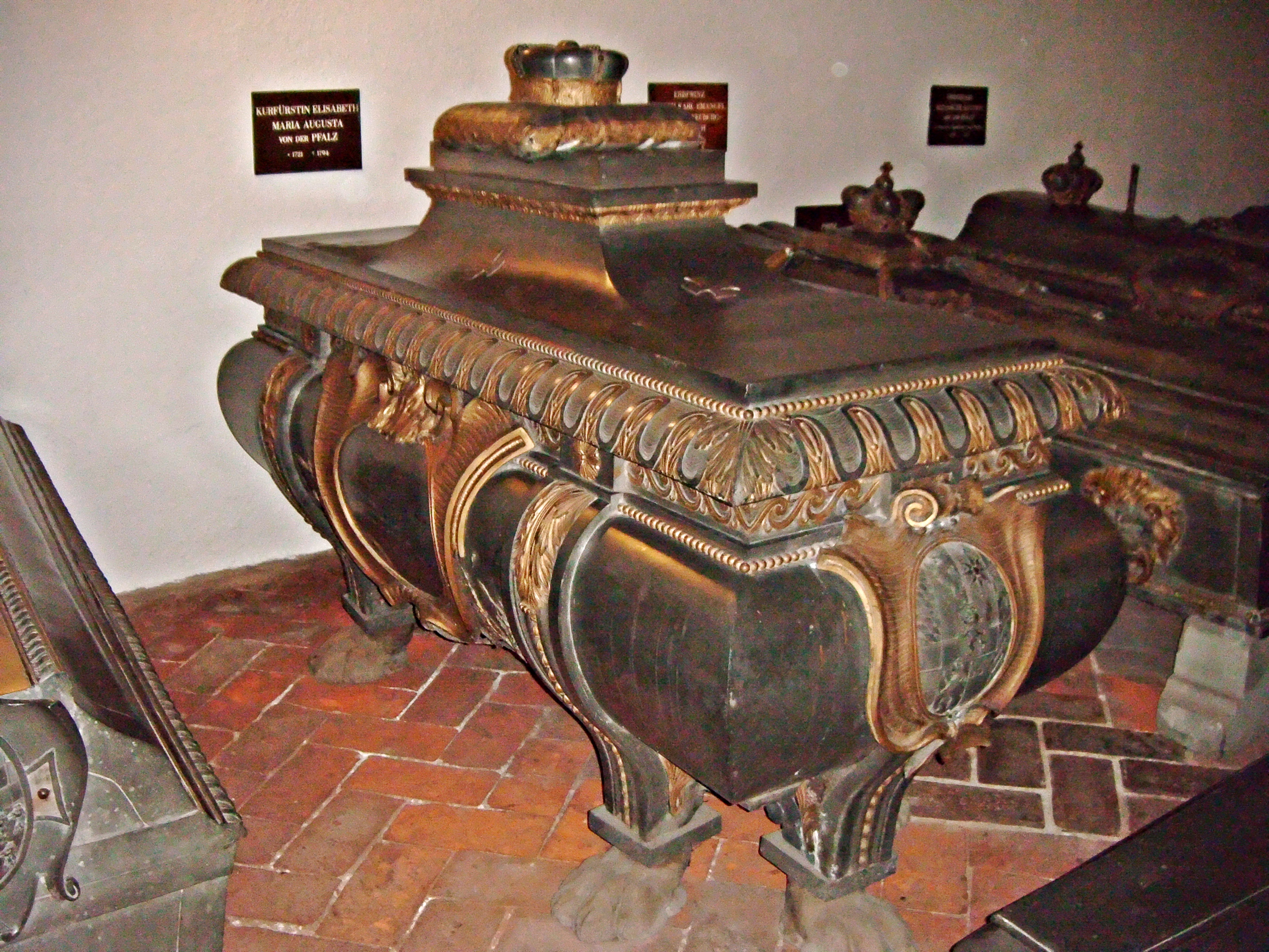 Sarg der pfälzischen bzw. bayerischen Kurfürstin Elisabeth Auguste von Pfalz-Sulzbach (1721-1794), St. Michaelskirche, München